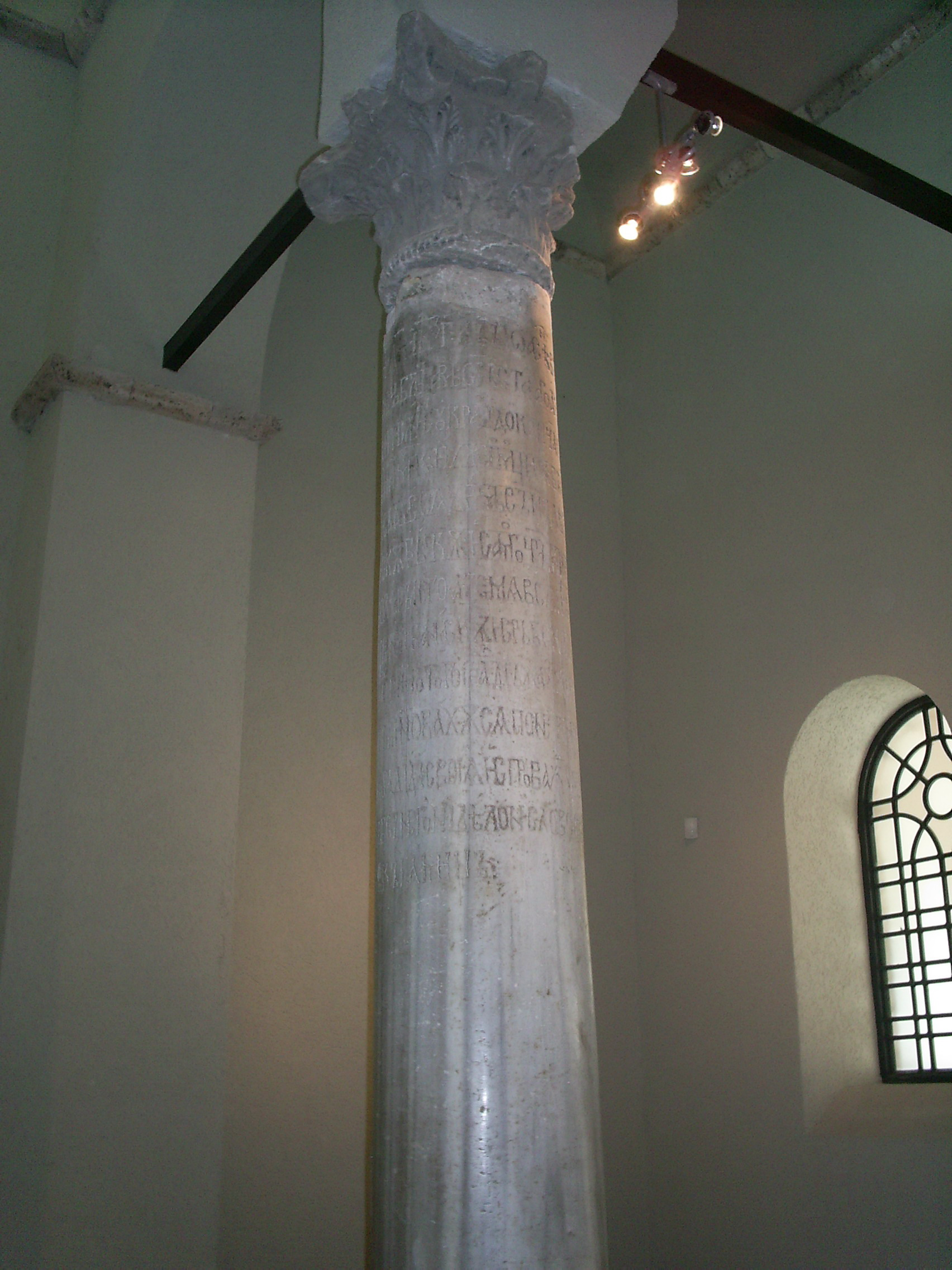 Колонна в Церкви Сорока Мучеников Севастийских в г. Велико Тырново поставленная при царе Иване Асене II в память его победы